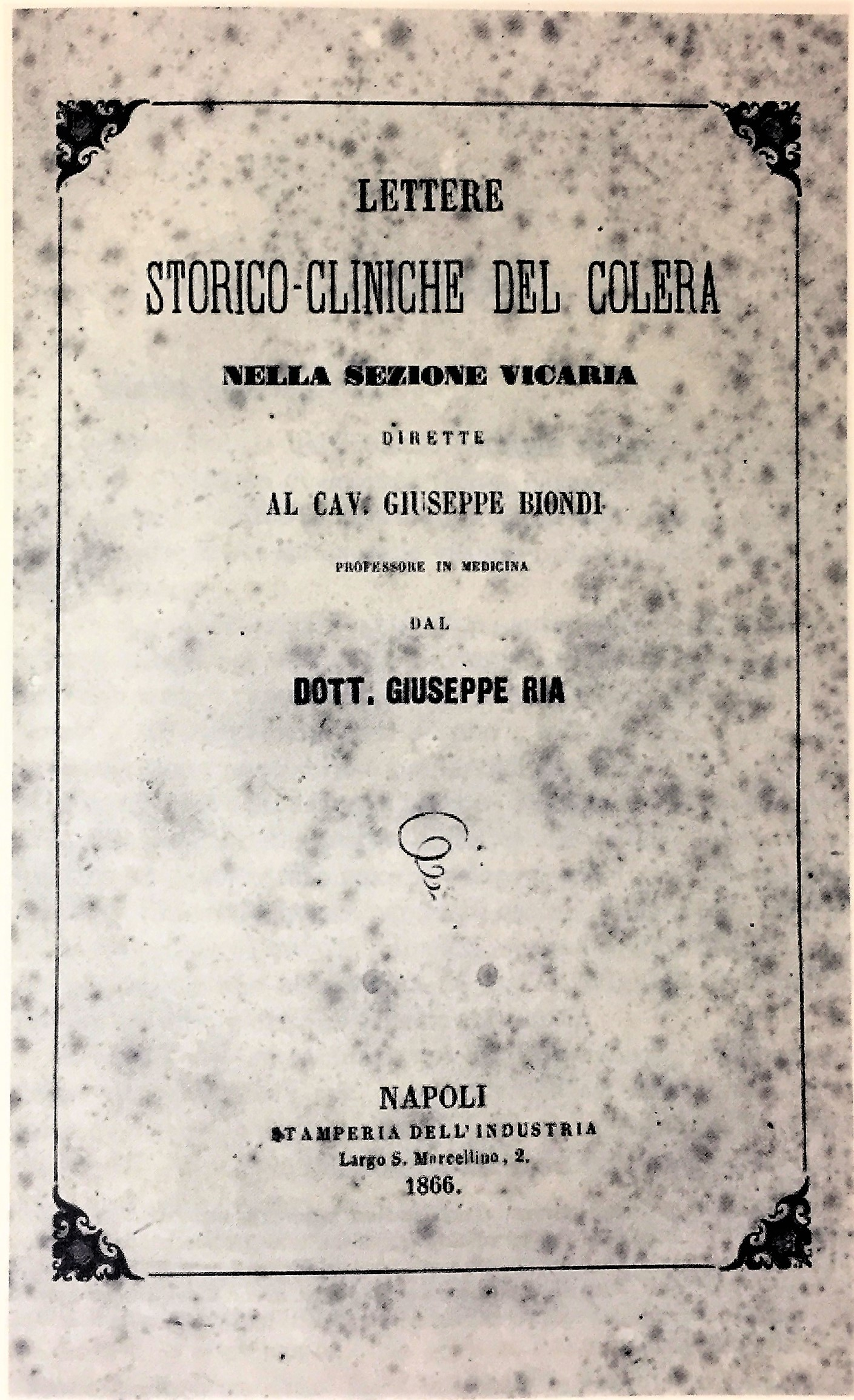 Copertina "Lettere storico-cliniche del colera nella Sezione Vicaria", 1866